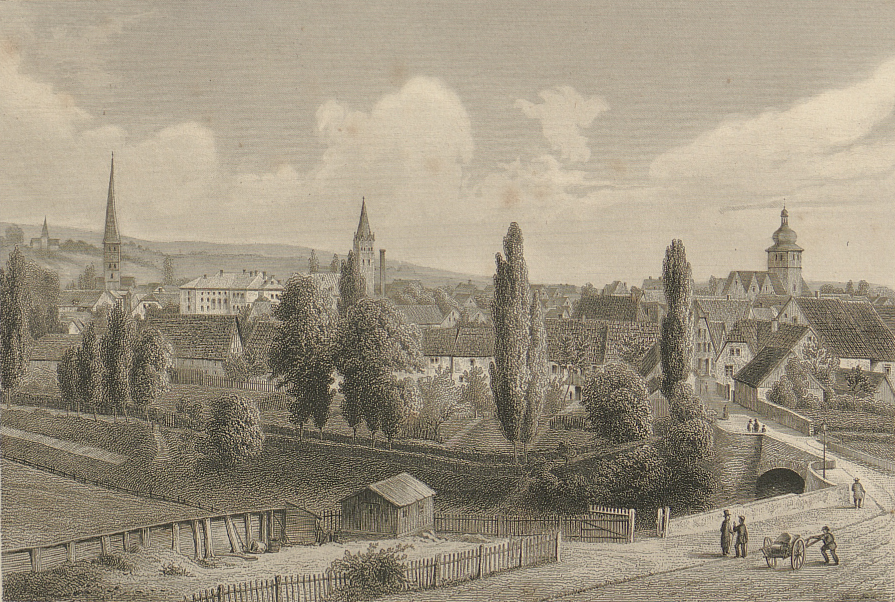 Herford